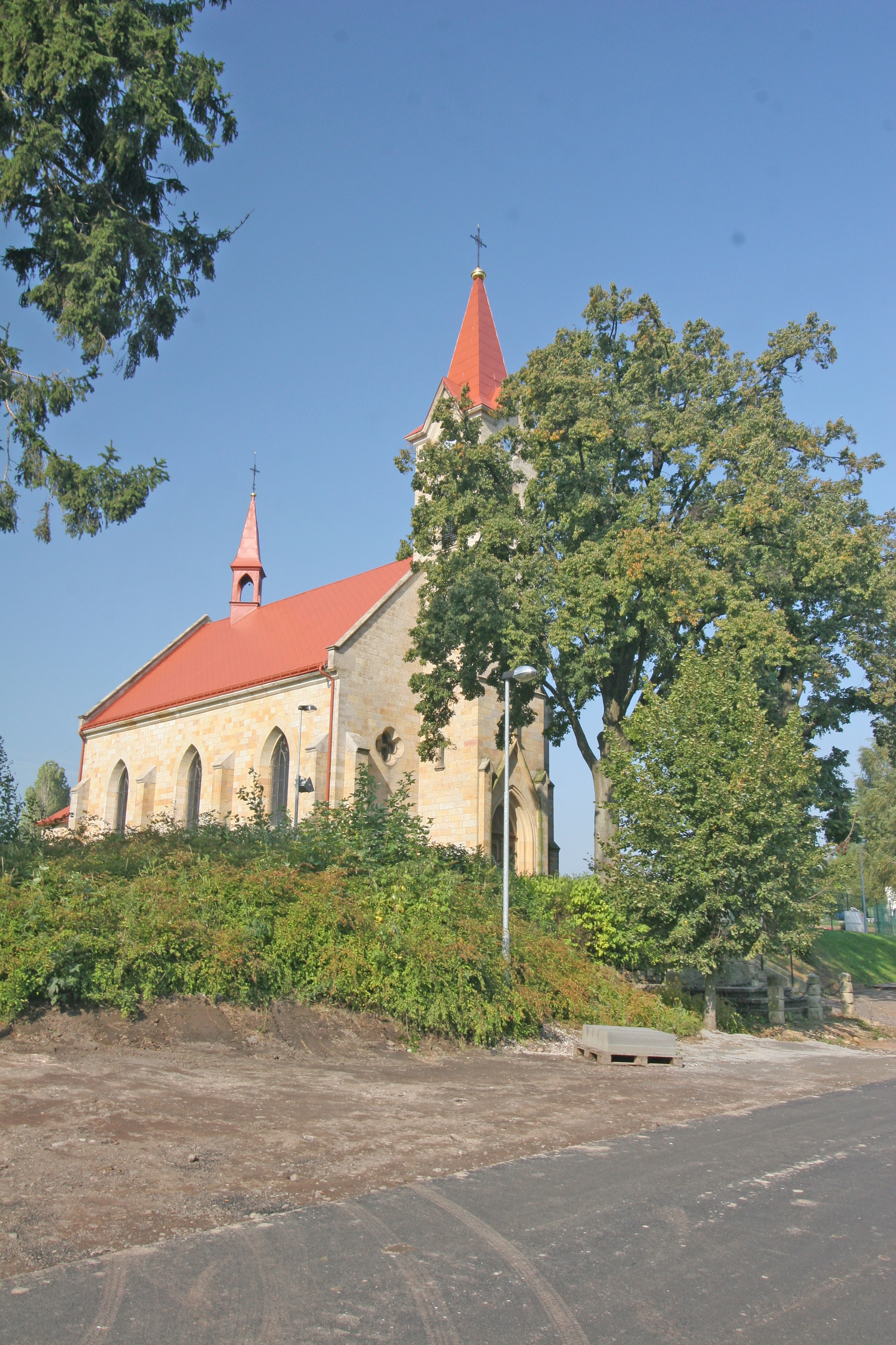 Vítězná kostel sv. Jana Nepomuckého